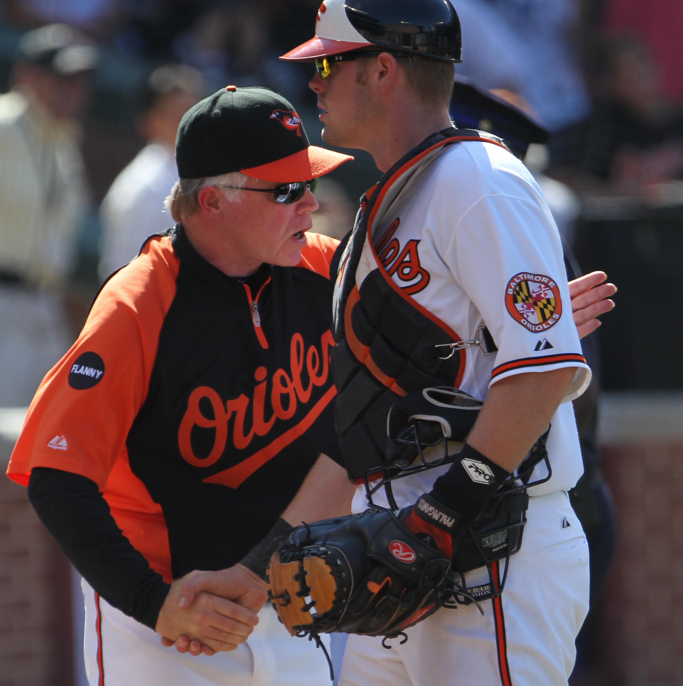 Buck Showalter (left) and Matt Wieters